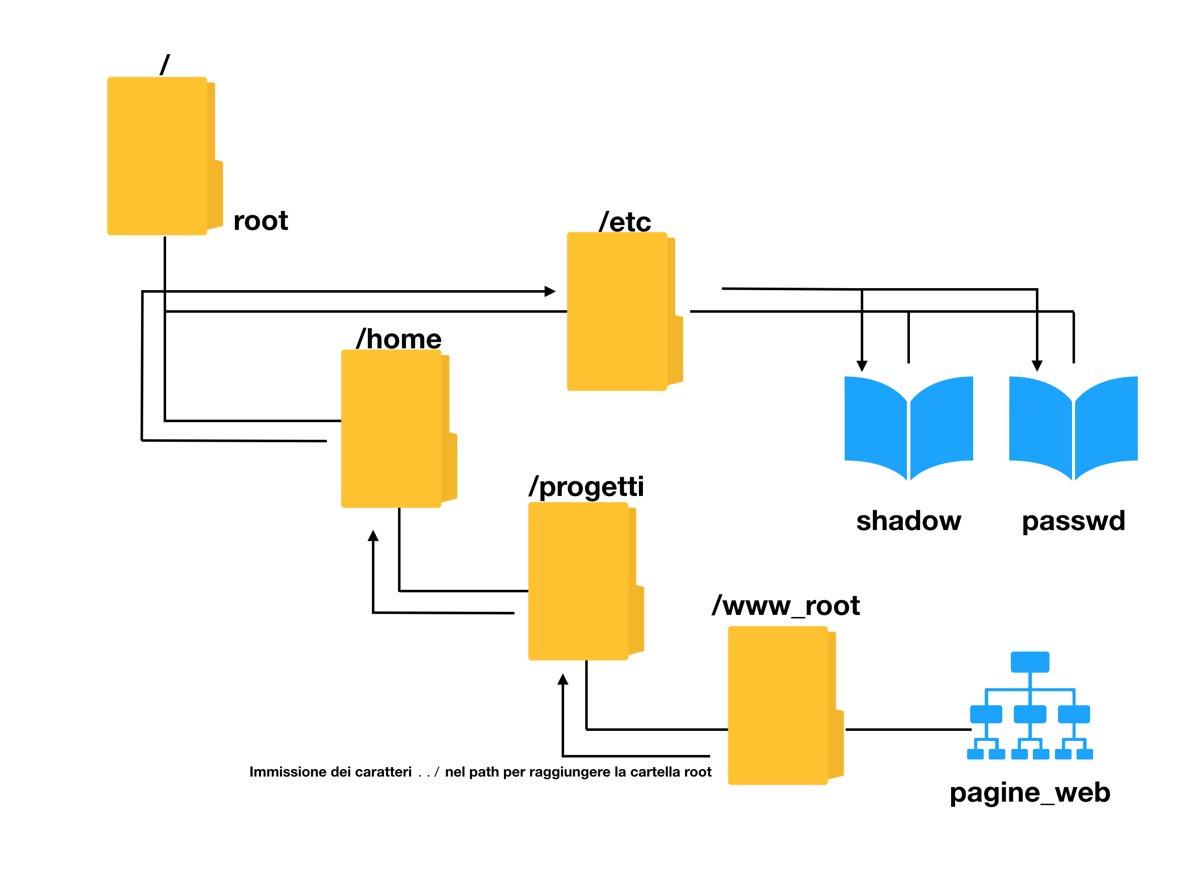 Funzionamento di un attacco directory traversal su macchina Unix.